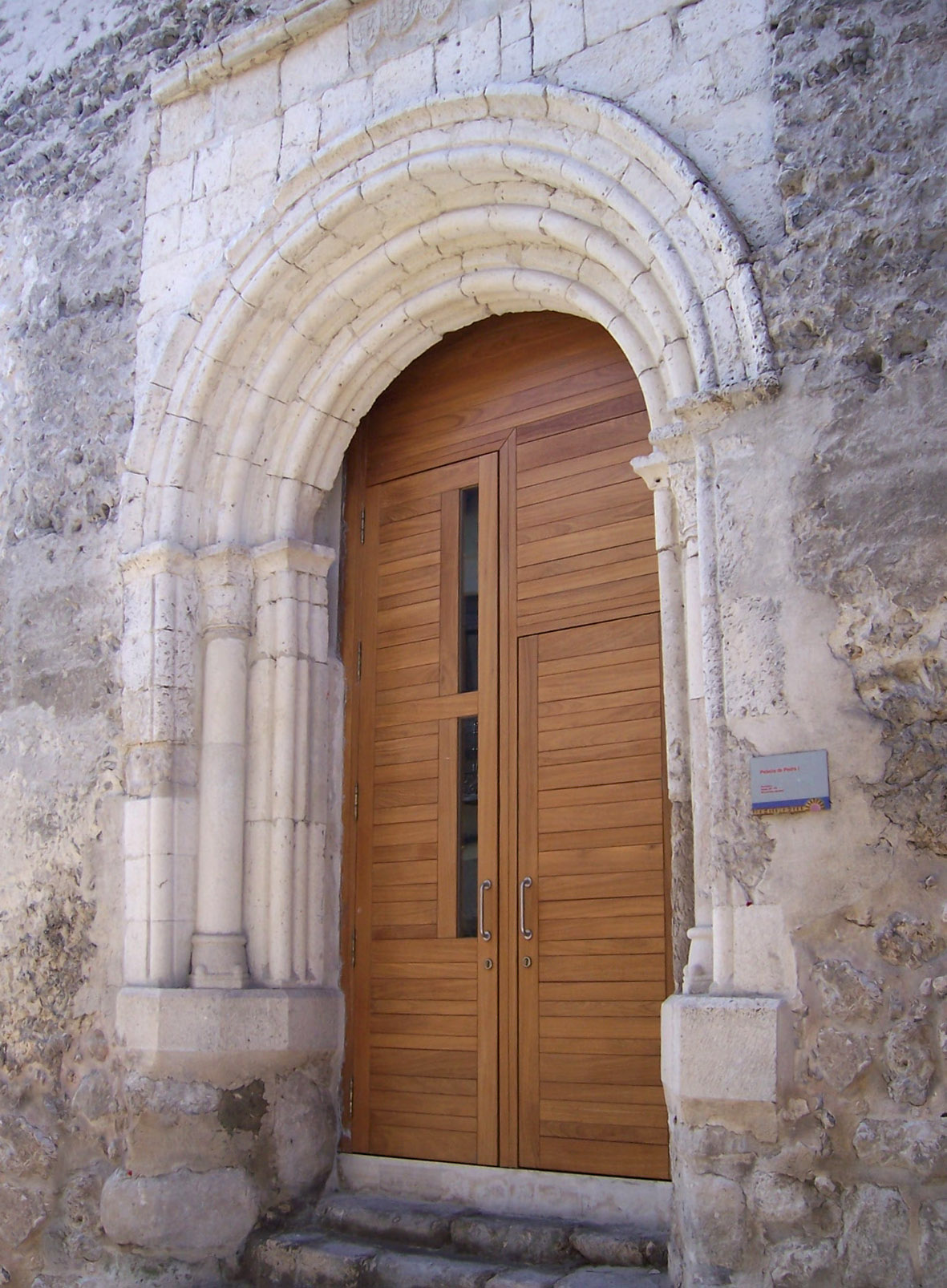 Portada del palacio de Pedro I el Cruel. Cuéllar (Segovia España). Autor de la imagen: Lourdes Cardenal, noviembre de 2005.